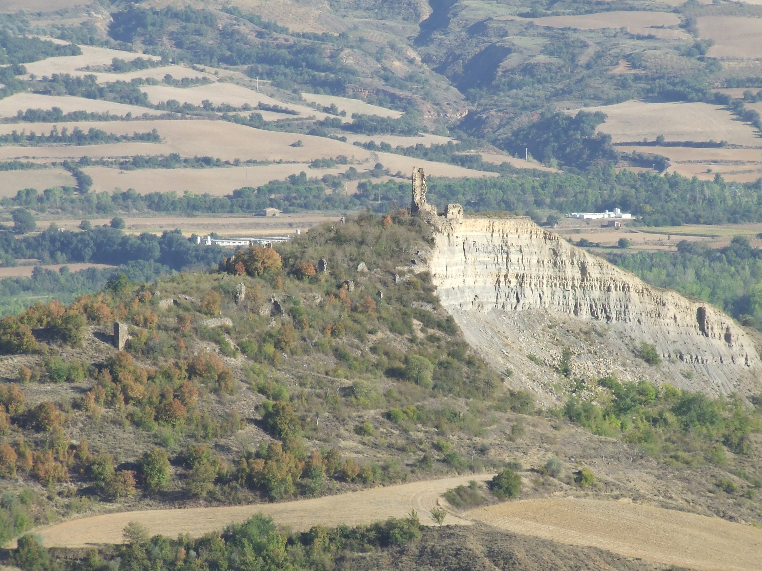 El poble vell de Puigcercós (Palau de Noguera, Tremp, Pallars Jussà)